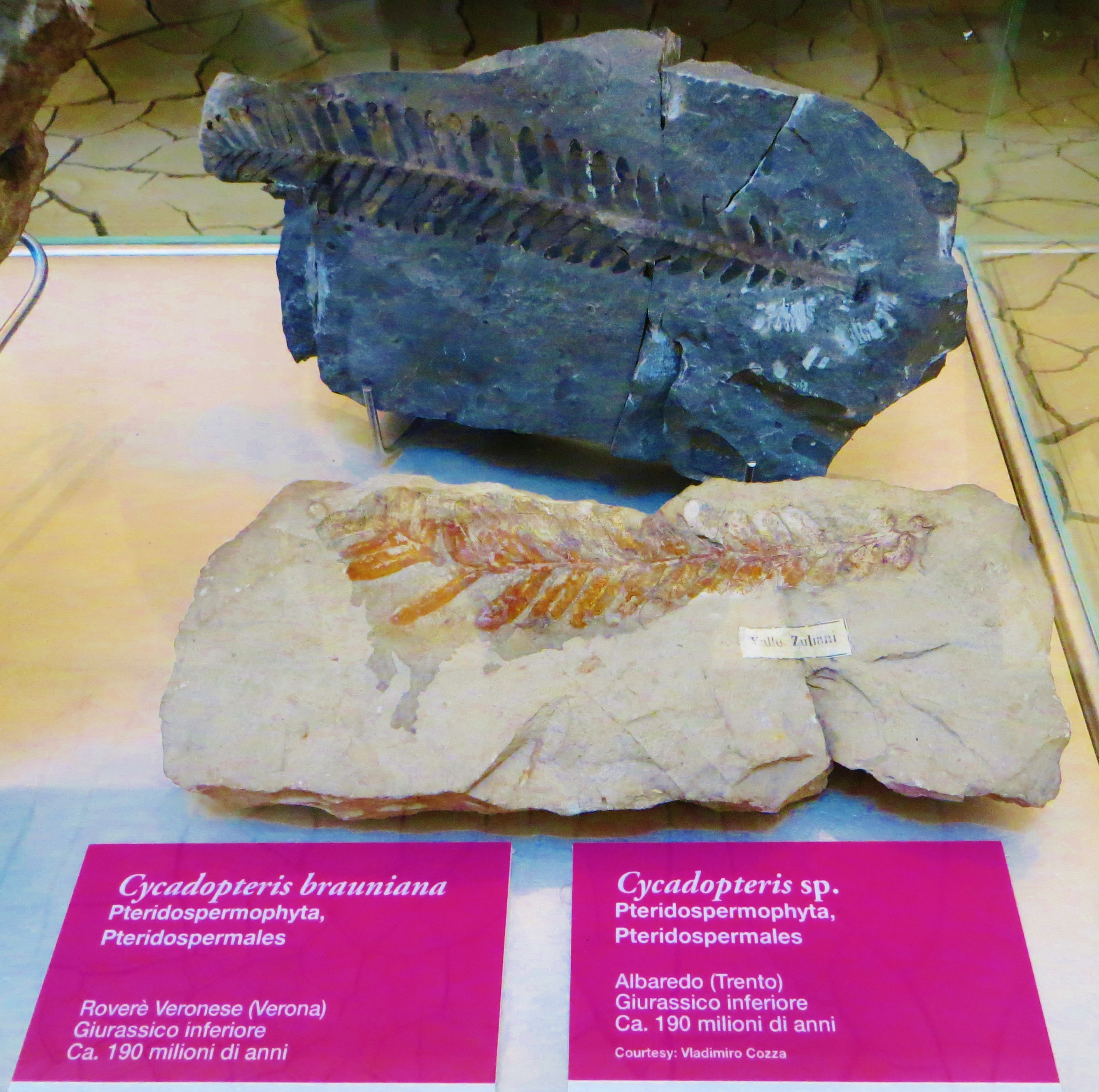 Fossil of Cycadopteris, an extinct plant- Took the picture at Muse (Trento)